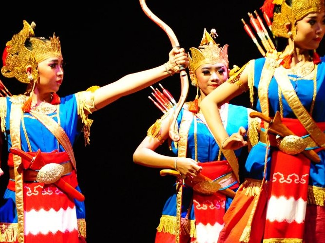 Tari Jurit Ampil Kridha Warastra merupakan tarian dari Kota Salatiga yang menceritakan tentang Perjanjian Salatiga pada tanggal 17 Maret 1757.